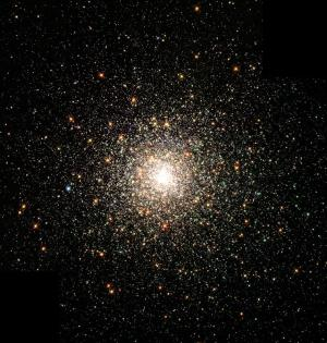 Ammasso globulare M80